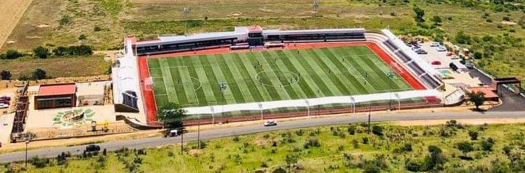 Foto tomada en la cima del Cerro de Tlacochahuaya ilustrando el Estadio Independiente MRCI, estadio sede y casa de los Chapulineros de Oaxaca